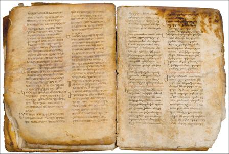 ლექციონარი (Q-1376)